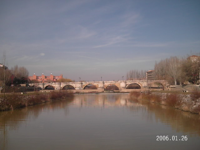 Río Bernesga a su paso por León. Puente de San Marcos. Autor: Santiago Pastrana